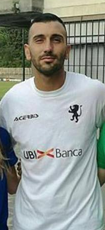 Dall'Oglio al Brescia nel 2017